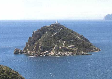 Islote de Escombreras et son phare